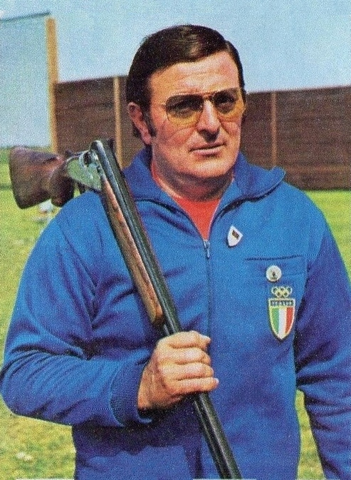 CAMPIONI dello SPORT 1973/74-Figurina n.369- SCALZONE - TIRO A VOLO -Rec